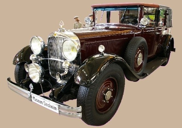 Der Maybach Zeppelin von 1930 mit Spohn-Karosserie Auto & Technik MUSEUM SINSHEIM / TECHNIK MUSEUM SPEYER